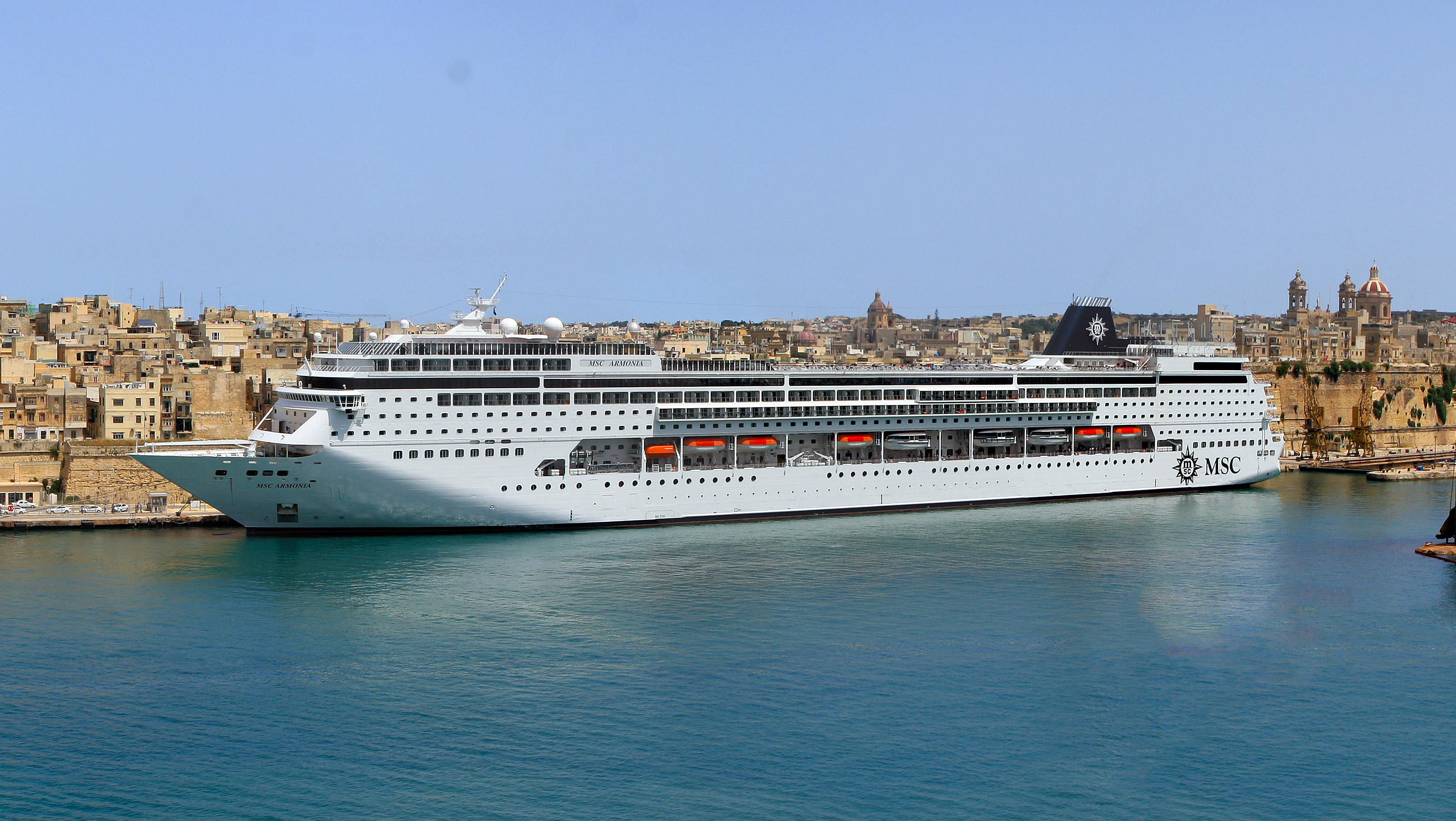 Malta